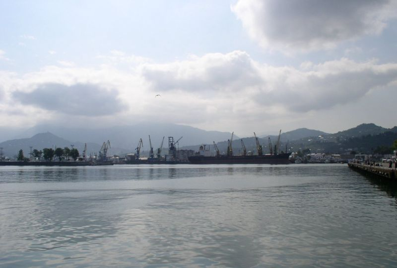 Hafen von Batumi, Georgien